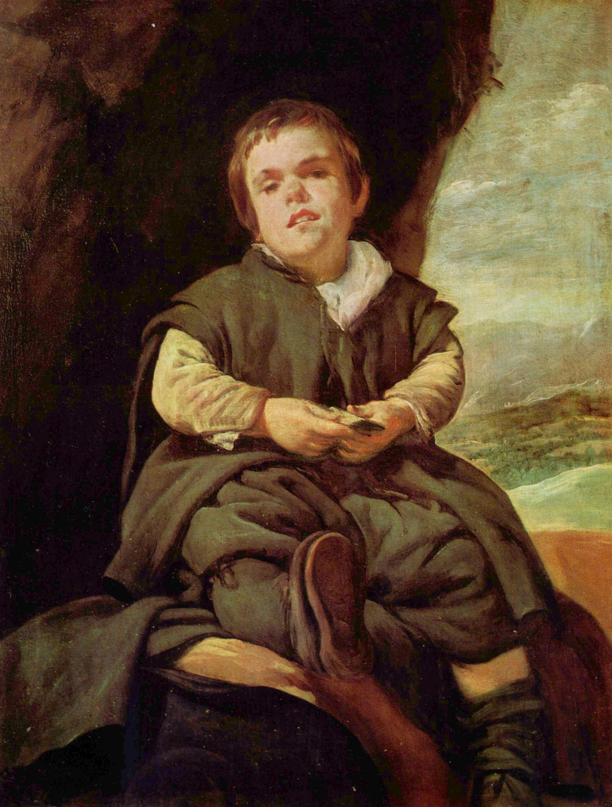 Retrato del bufón español Francisco Lezcano, que fue apodado El niño de Vallecas.